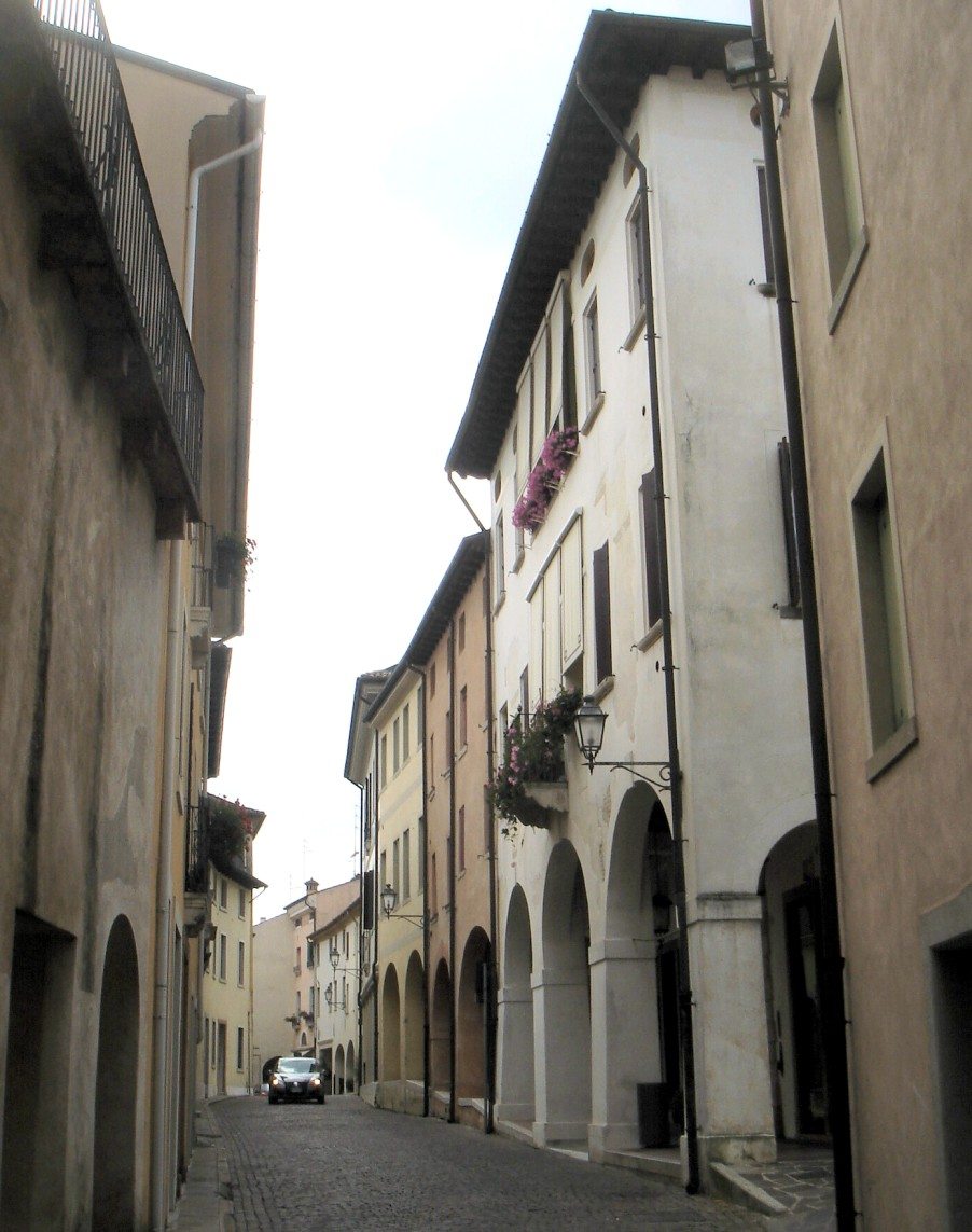 Conegliano (Treviso): veduta della Contrada Granda da Porta Monticano, con Palazzo Graziani sulla destra.